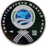 Памятная монета Кыргызстана - Шанхайская организация сотрудничества - 10 сом 2007 - Серебро 925 Кыргызча: Кызматташуунун Шанхай уюму